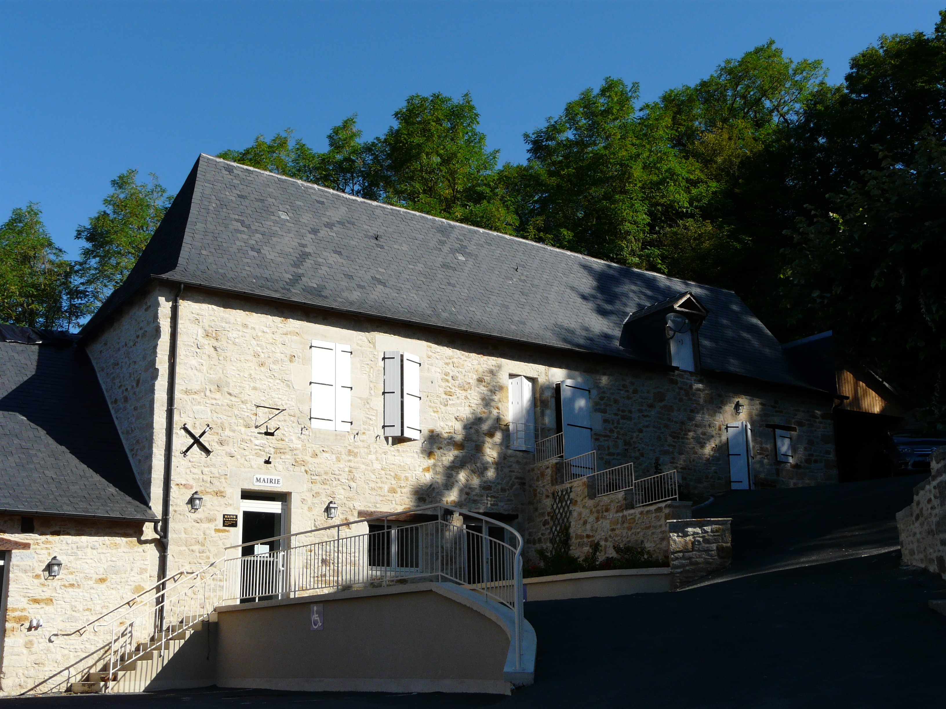 La mairie de Grèzes, Dordogne, France.